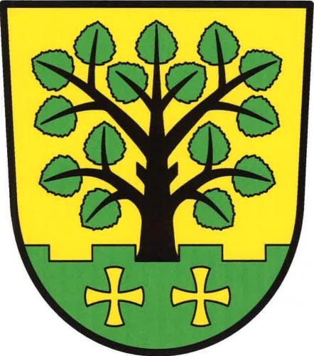 Osiky znak